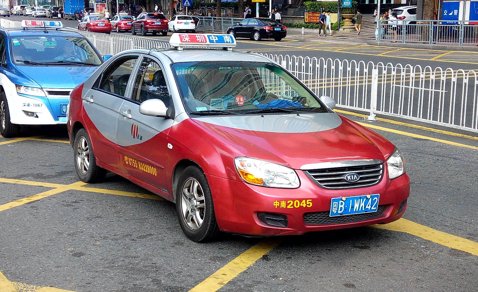 深圳红色的士 起亚Cerato